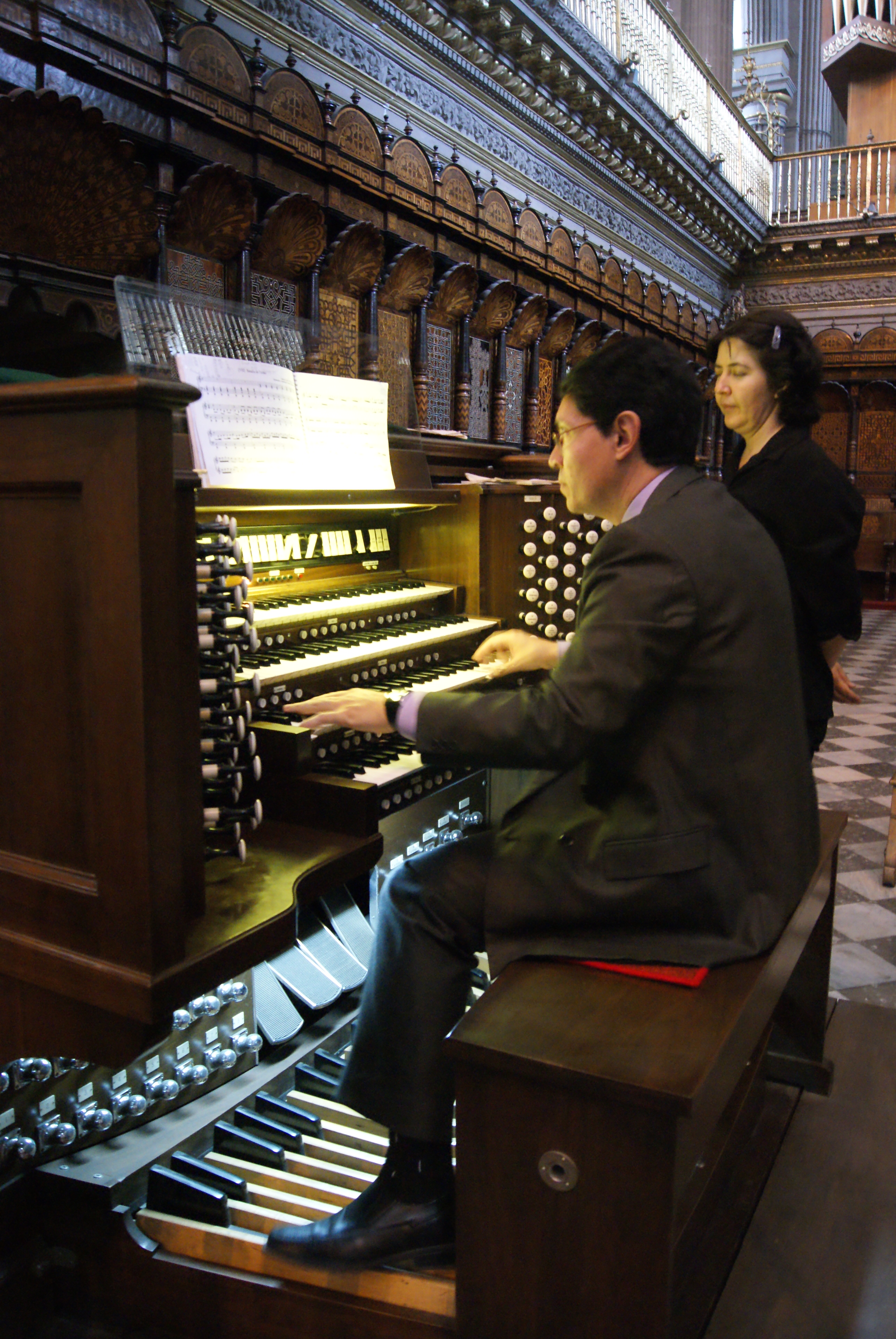 Gustavo Delgado Parra en concierto en el órgano de la Catedral de Puebla, durante el Festival Pasión 2010